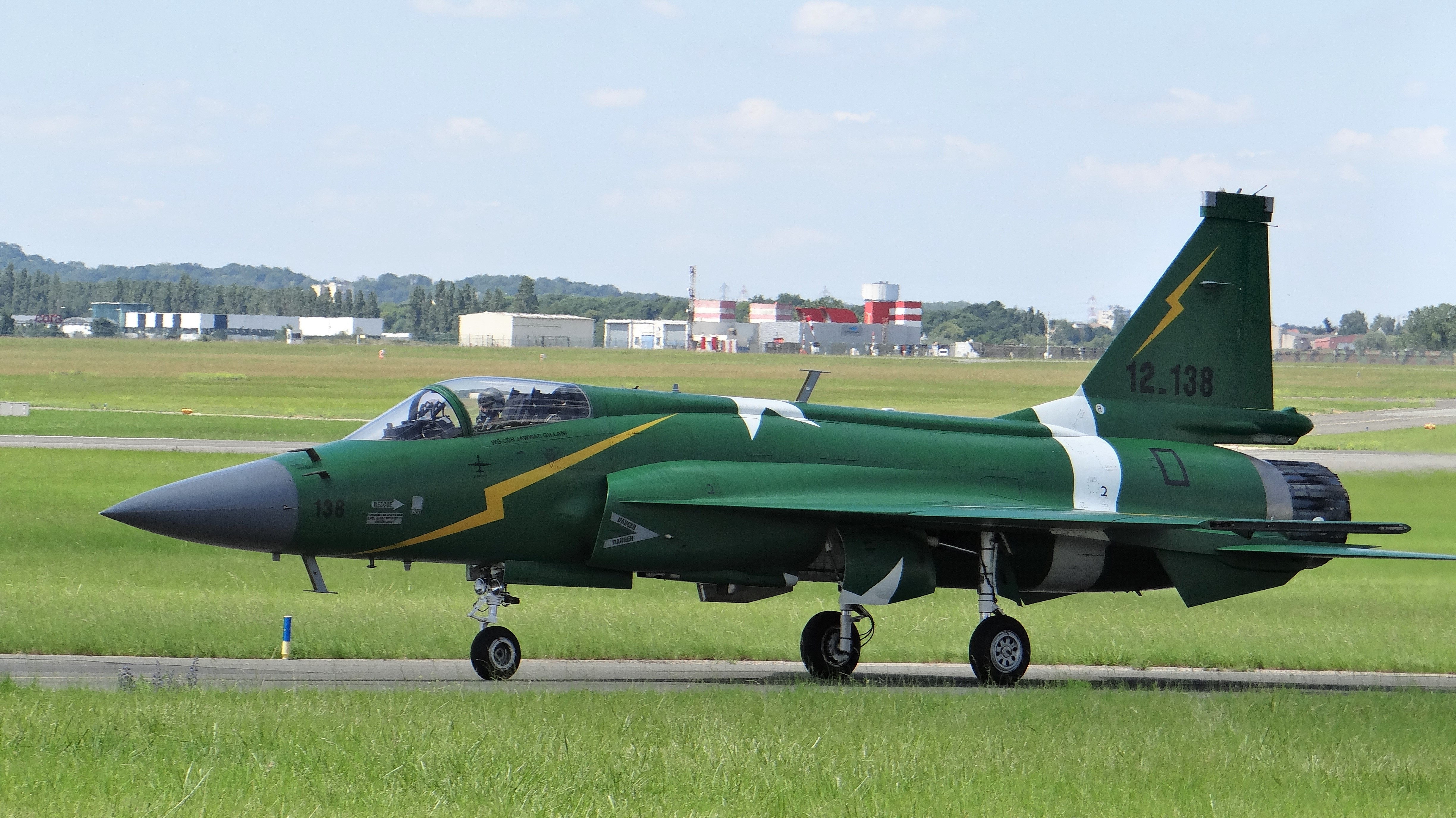 PAK Kamra JF-17 Thunder at Paris Air Show, June 2019